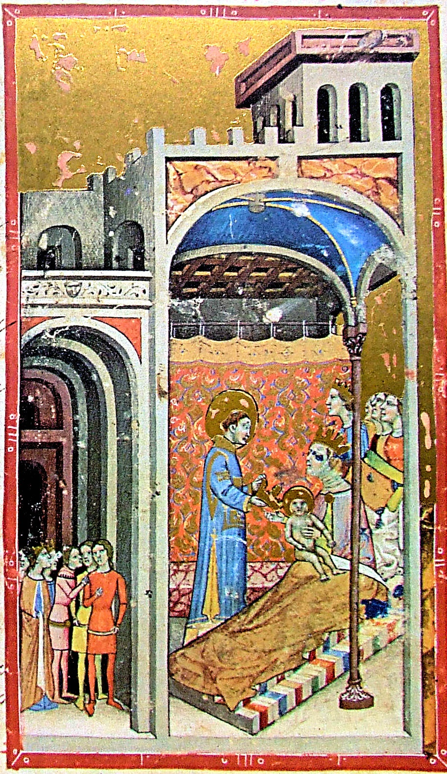 Stephen I's birth